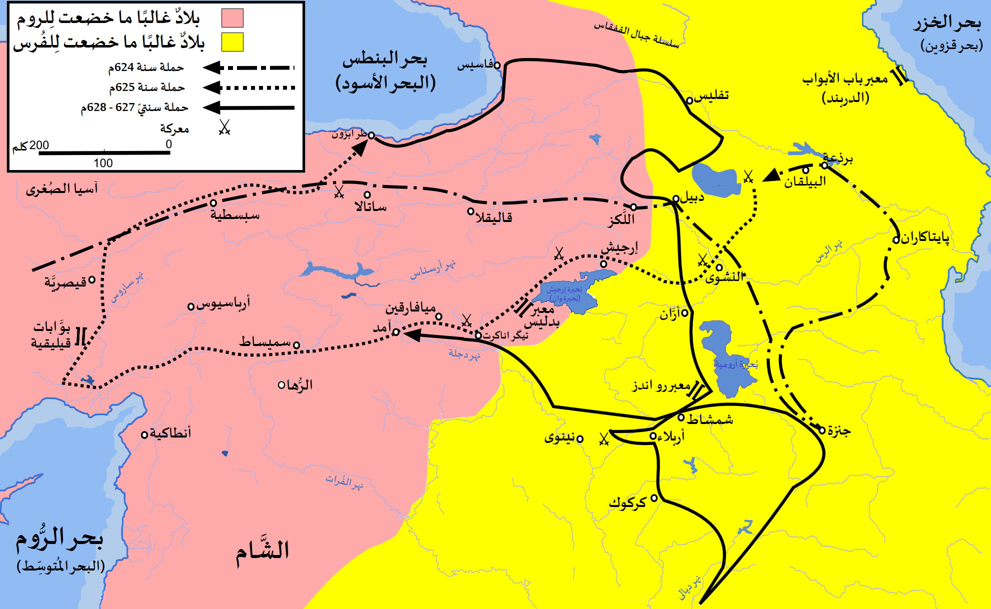 خريطة تُبيِّن درب الحملة البيزنطيَّة بقيادة الإمبراطور هرقل، لِقتال الفُرس في بلاد ما بين النهرين ما بين سنتيّ 624 و628م.